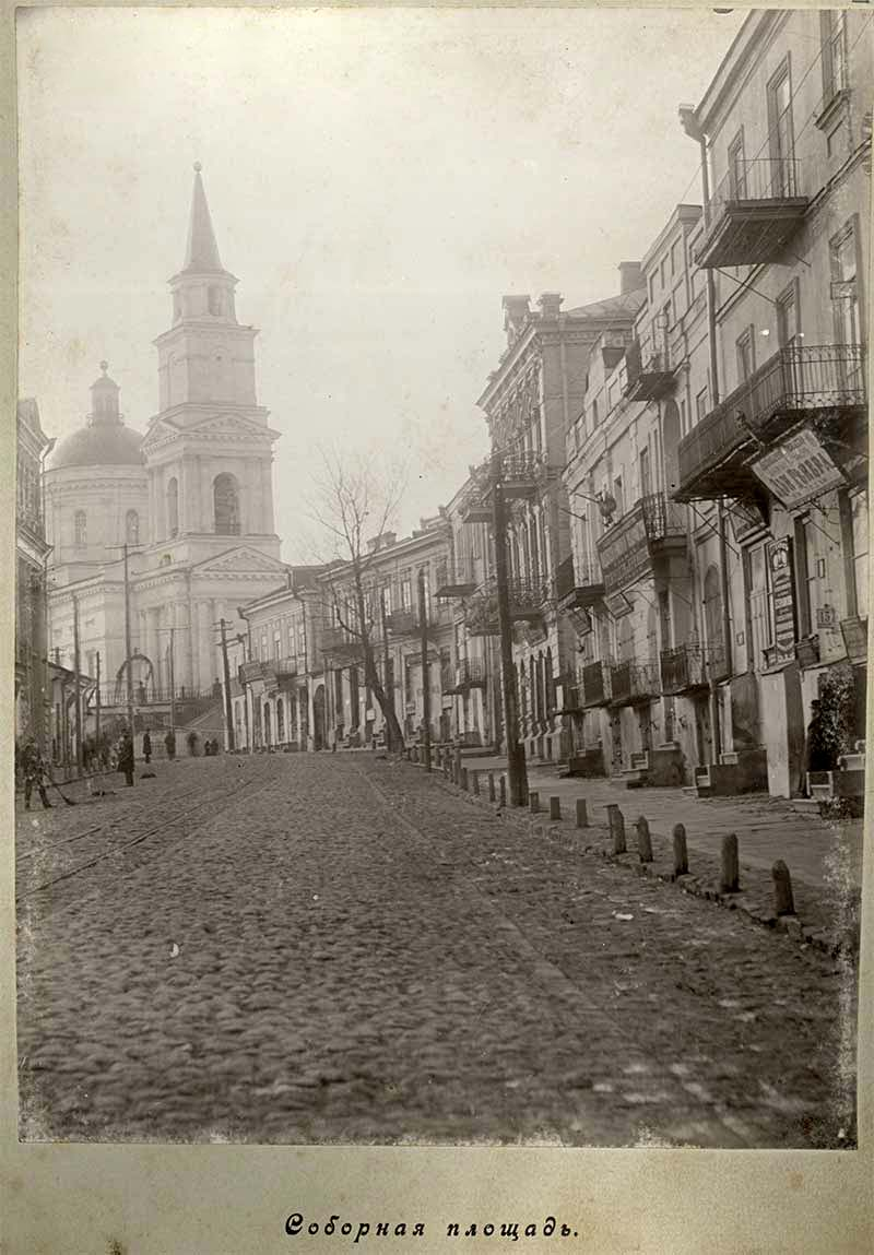 Успенский собор в Бердичеве